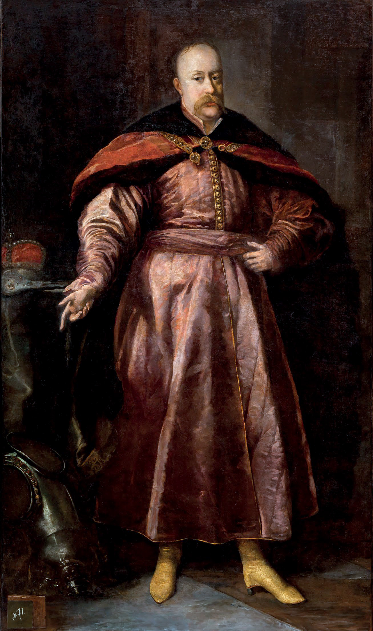 Беларуская (тарашкевіца): Партрэт Януша Радзівіла (Januš Radzivił) па рэстаўрацыі ў 2018 годзе. Зь Нясьвіскай партрэтнай галерэі.